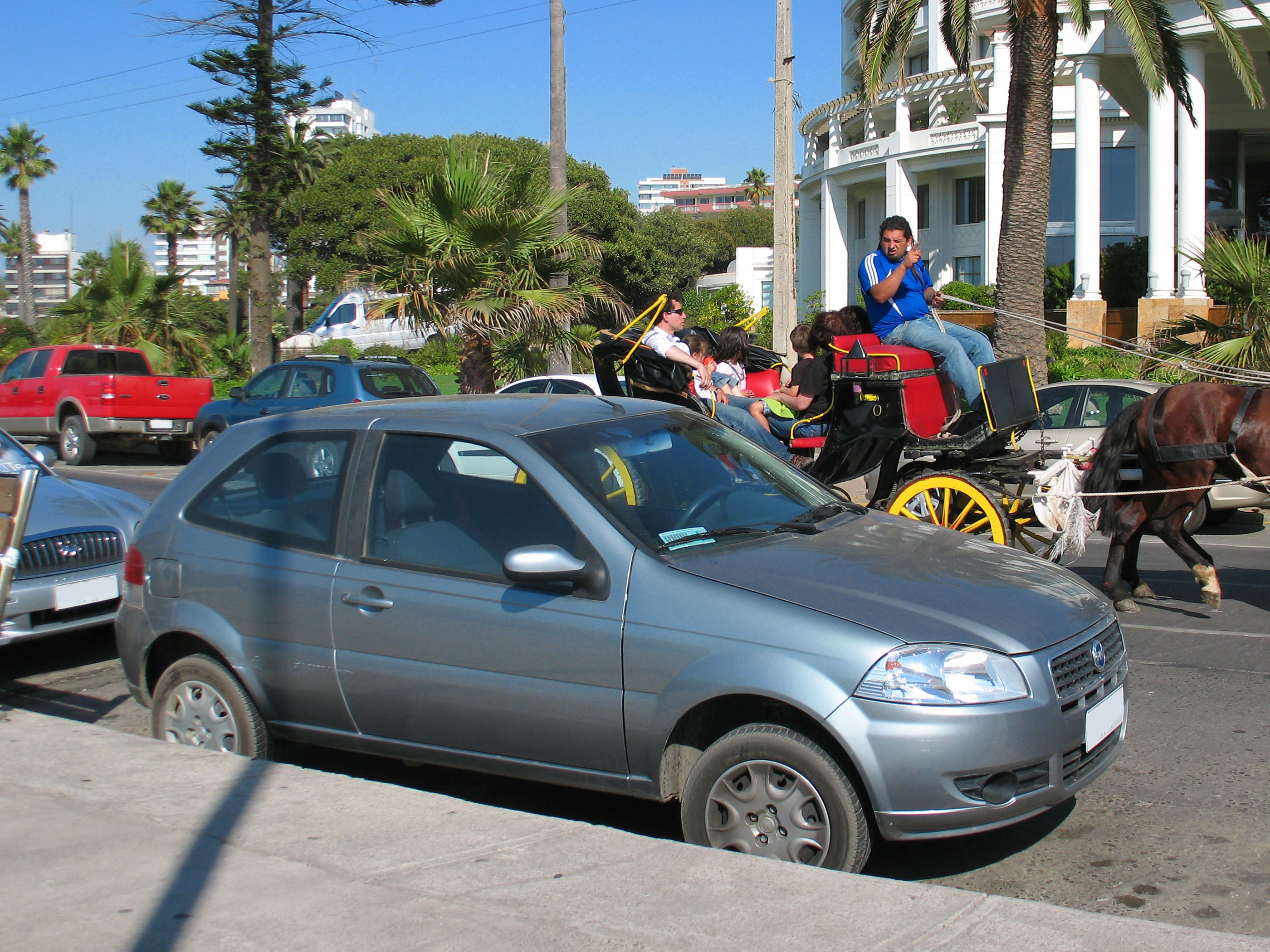 Viña del mar